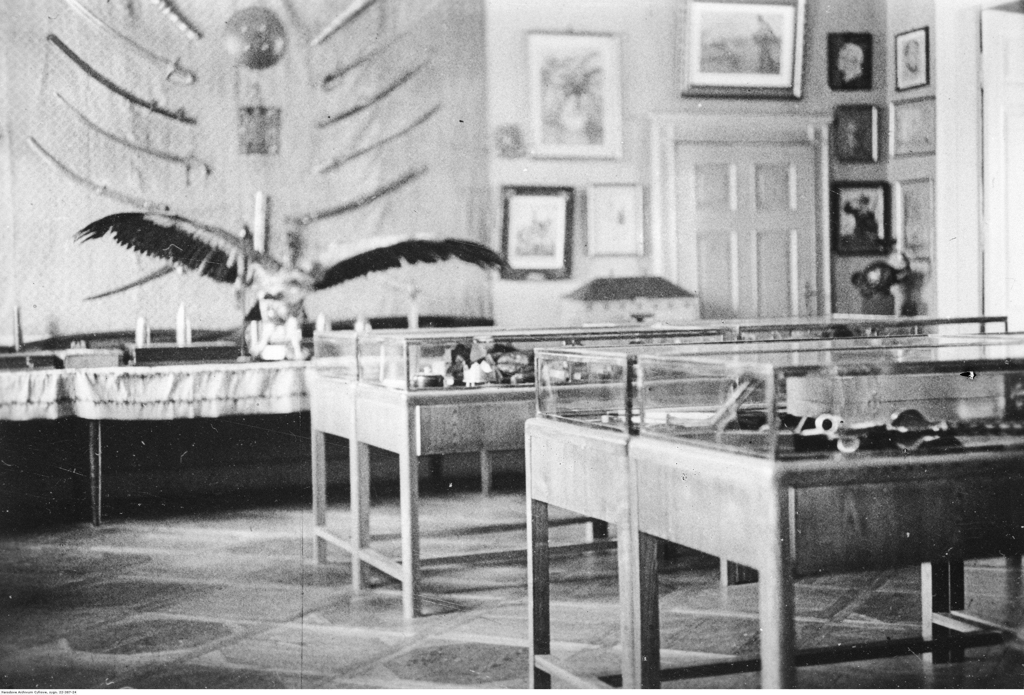 Gabloty z eksponatami, broń.